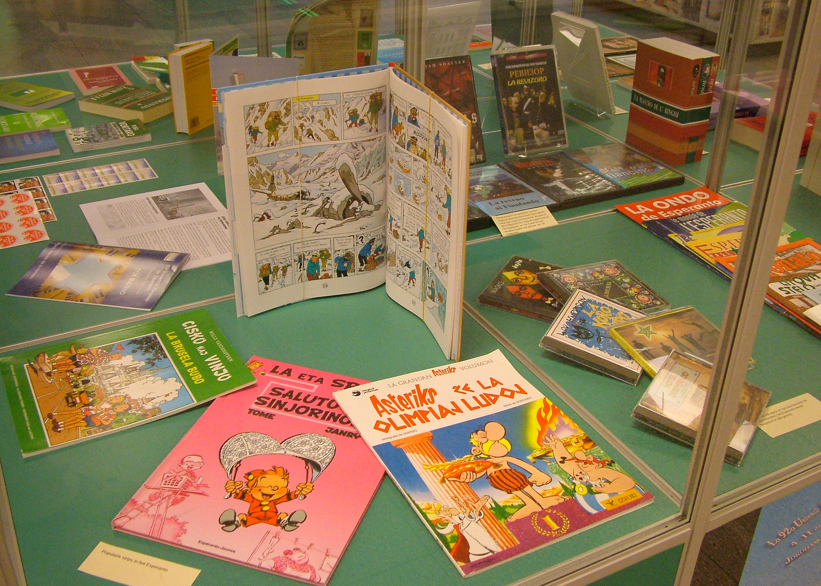 Universala Kongreso de Esperanto, Roterdamo 2008. Ekspozicio pri Esperanto kaj UEA dum la UK 2008, centra urba biblioteko de Roterdamo.